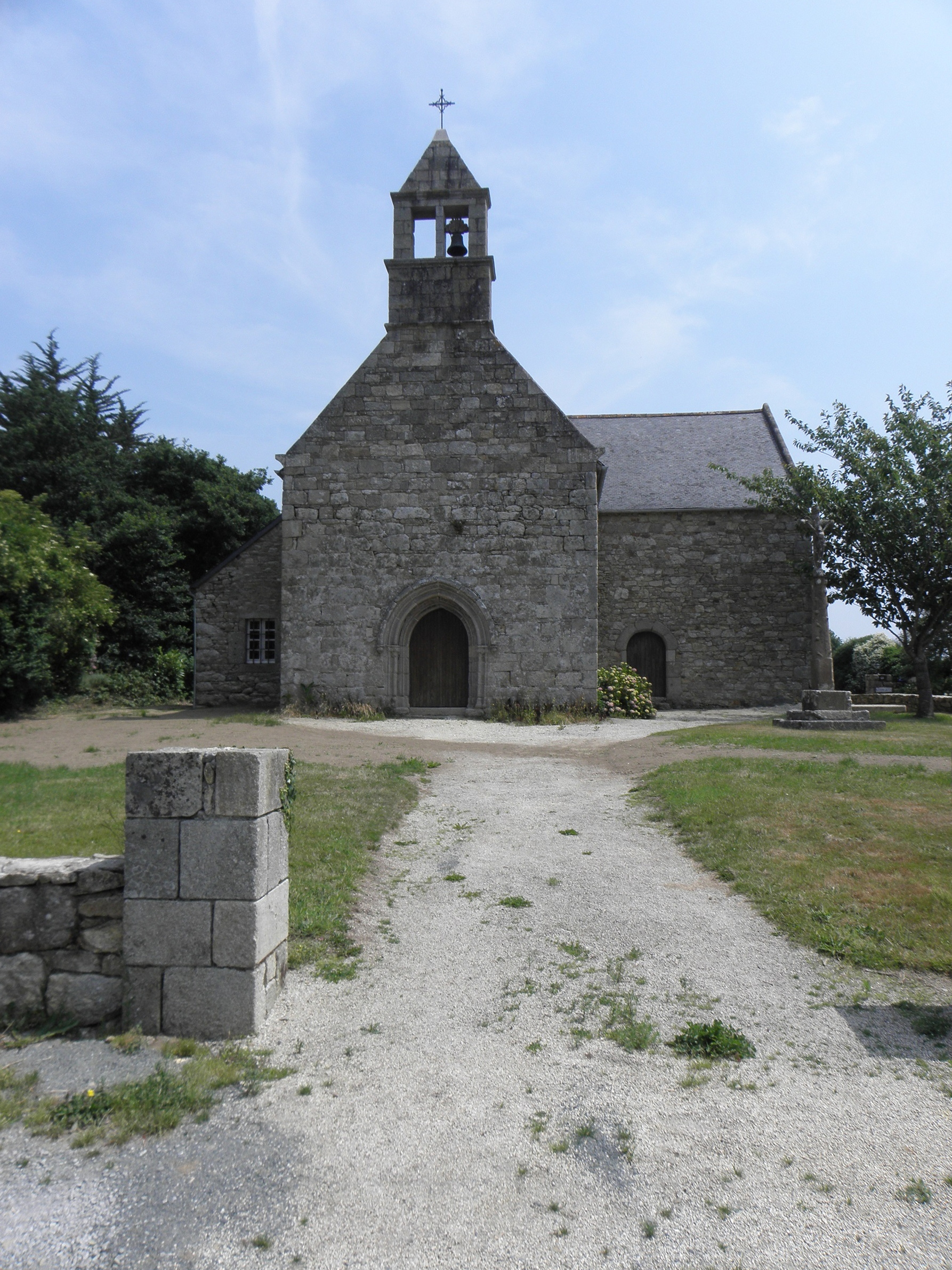 Chapelle de Kermaria-an-Lan en Squiffiec (22). Façade occidentale.